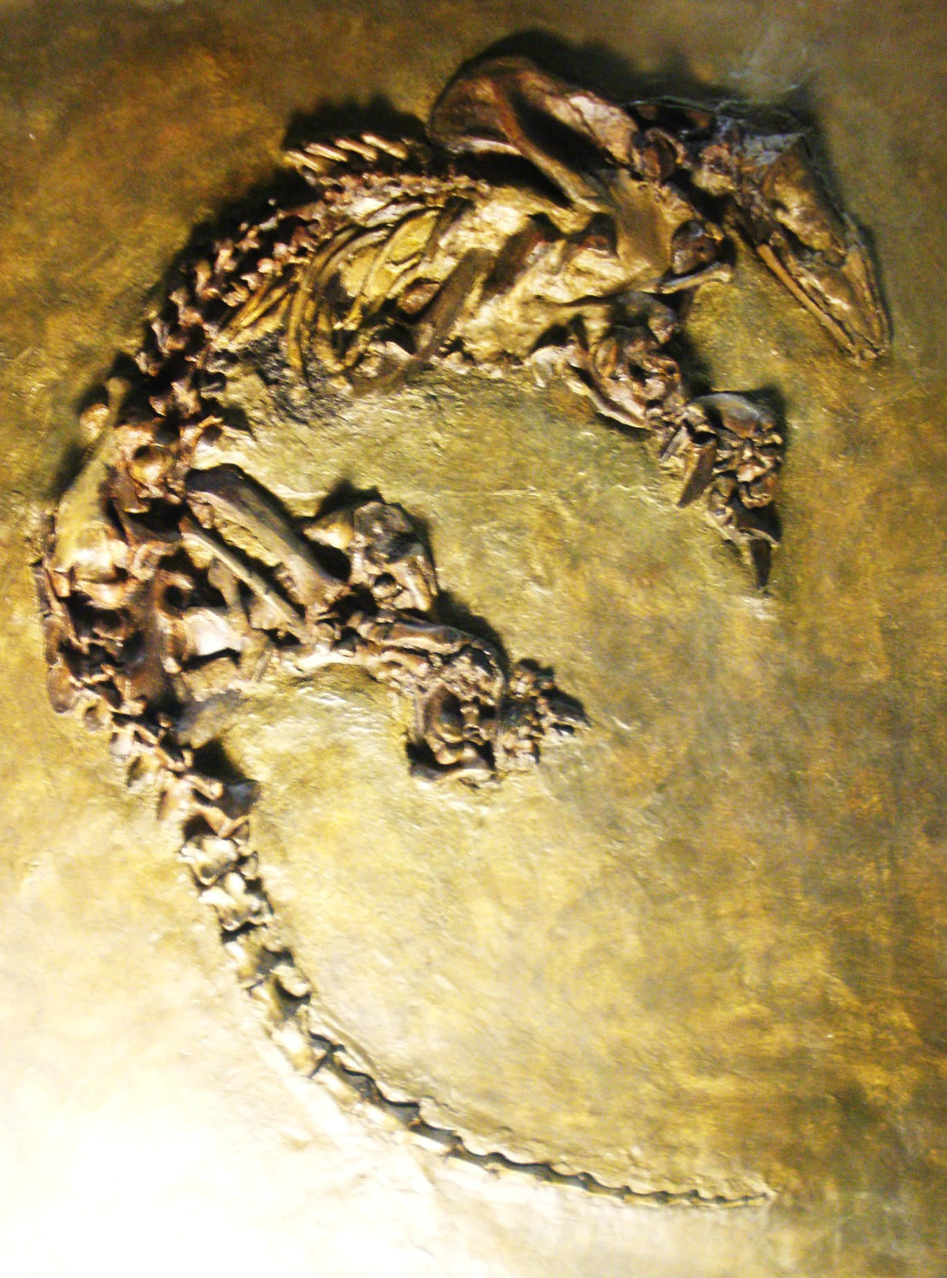 Fossil of Eurotamandua, an extinct mammal- Took the photo at Senckenberg Museum of Frankfurt